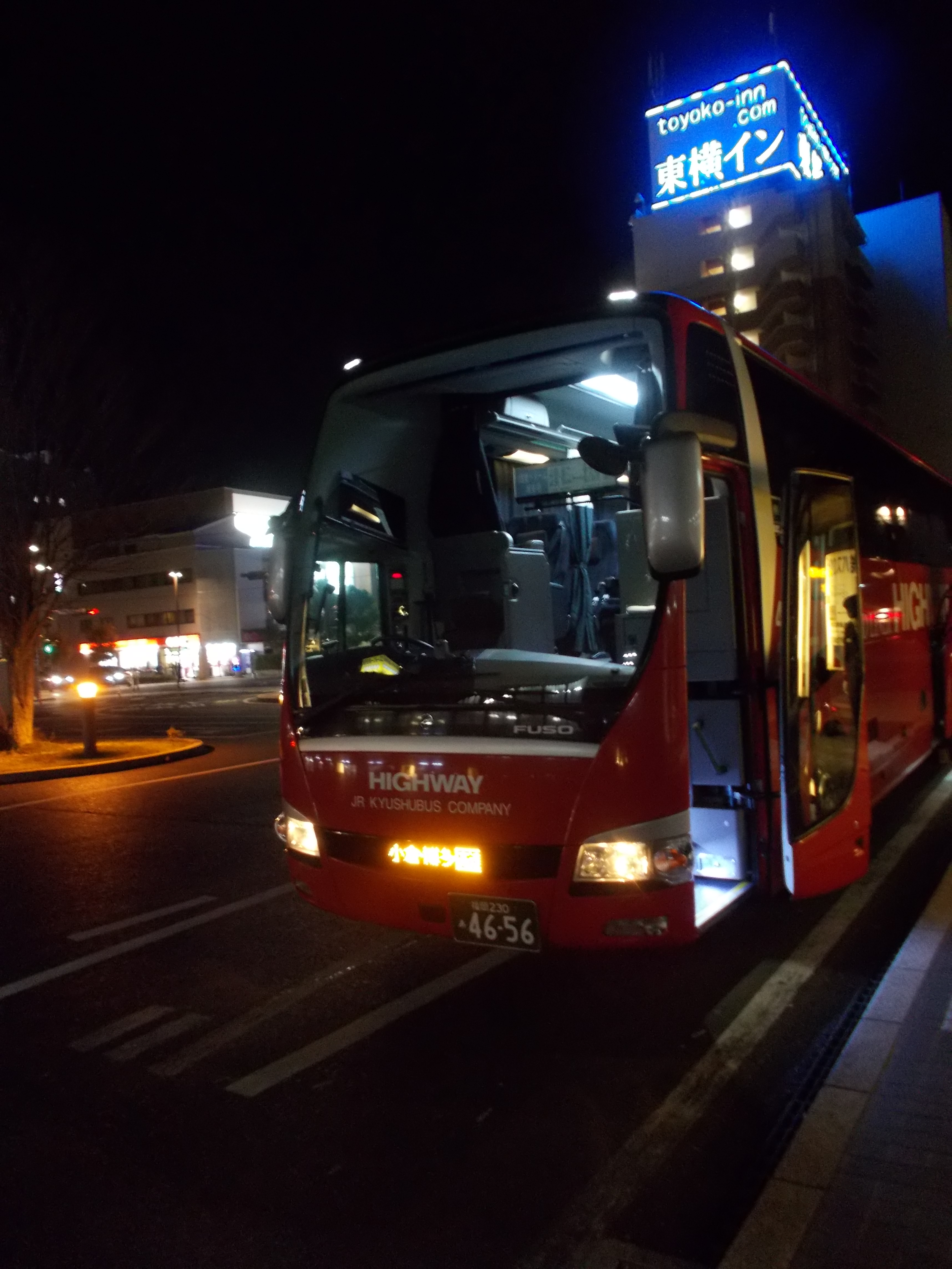 出雲ドリーム博多号 ＪＲ九州バス 博多支店 車両番号:744-16556